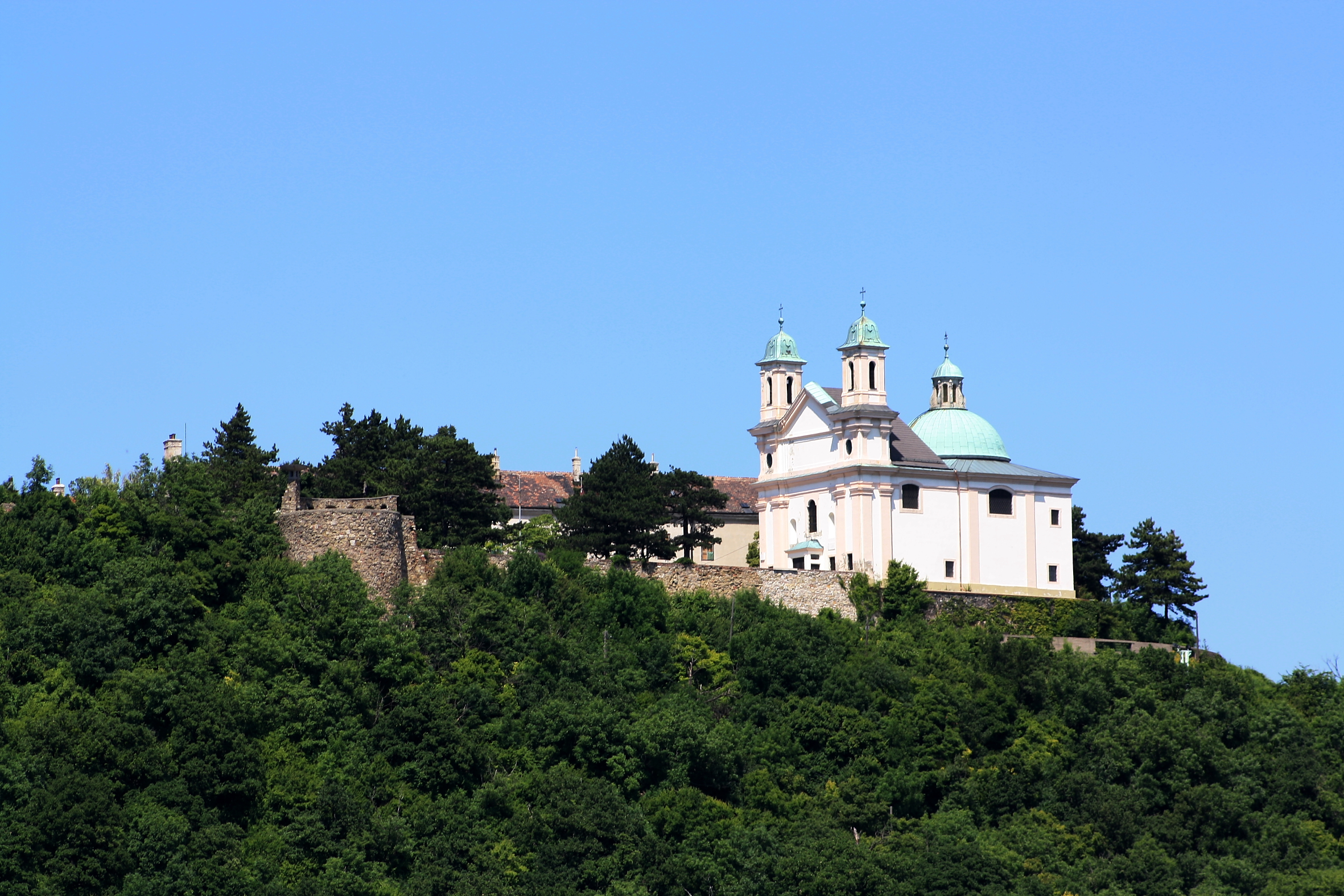 Das Plateau des Leopoldsbergs von Südwesten aus gesehen mit der Leopoldsbergkirche, dem Heimkehrer-Gedächtnismal und der Leopoldsbergburg.